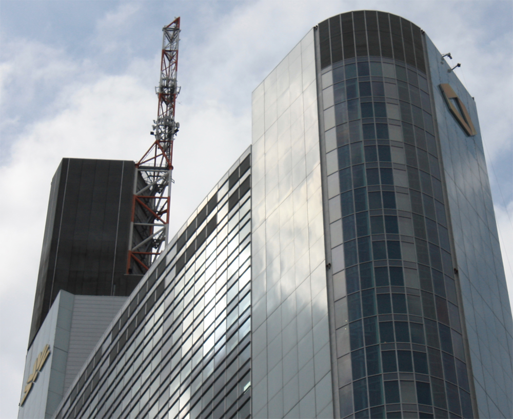 Auf der östlichen Turmseite des Commerzbank-Towers wurde bereits das neue Logo montiert. Auf der Nord- und Westseite des Towers sind die alten Logos noch angebracht.